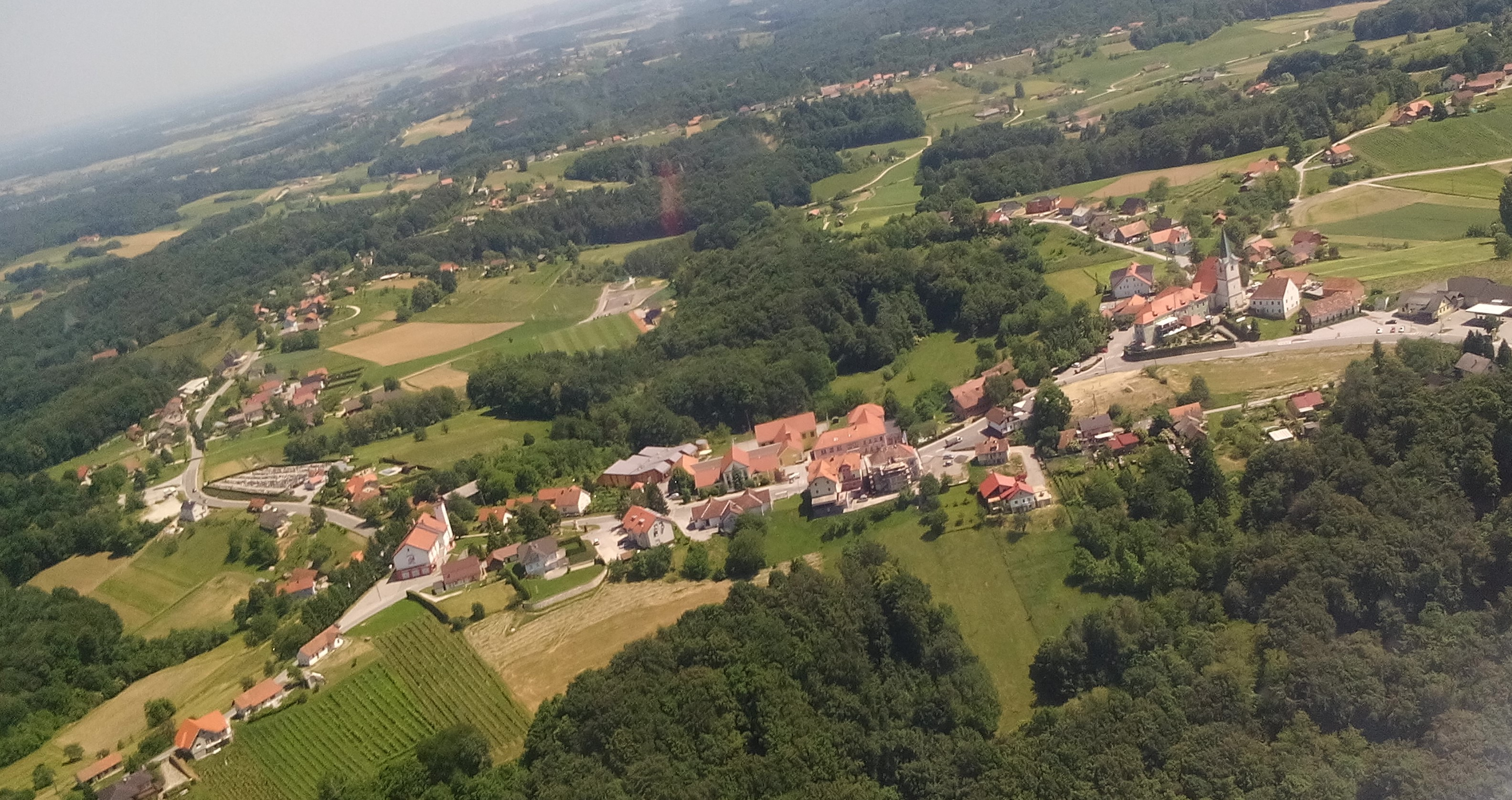 Cerkvenjak iz zraka, slikano iz severne strani.